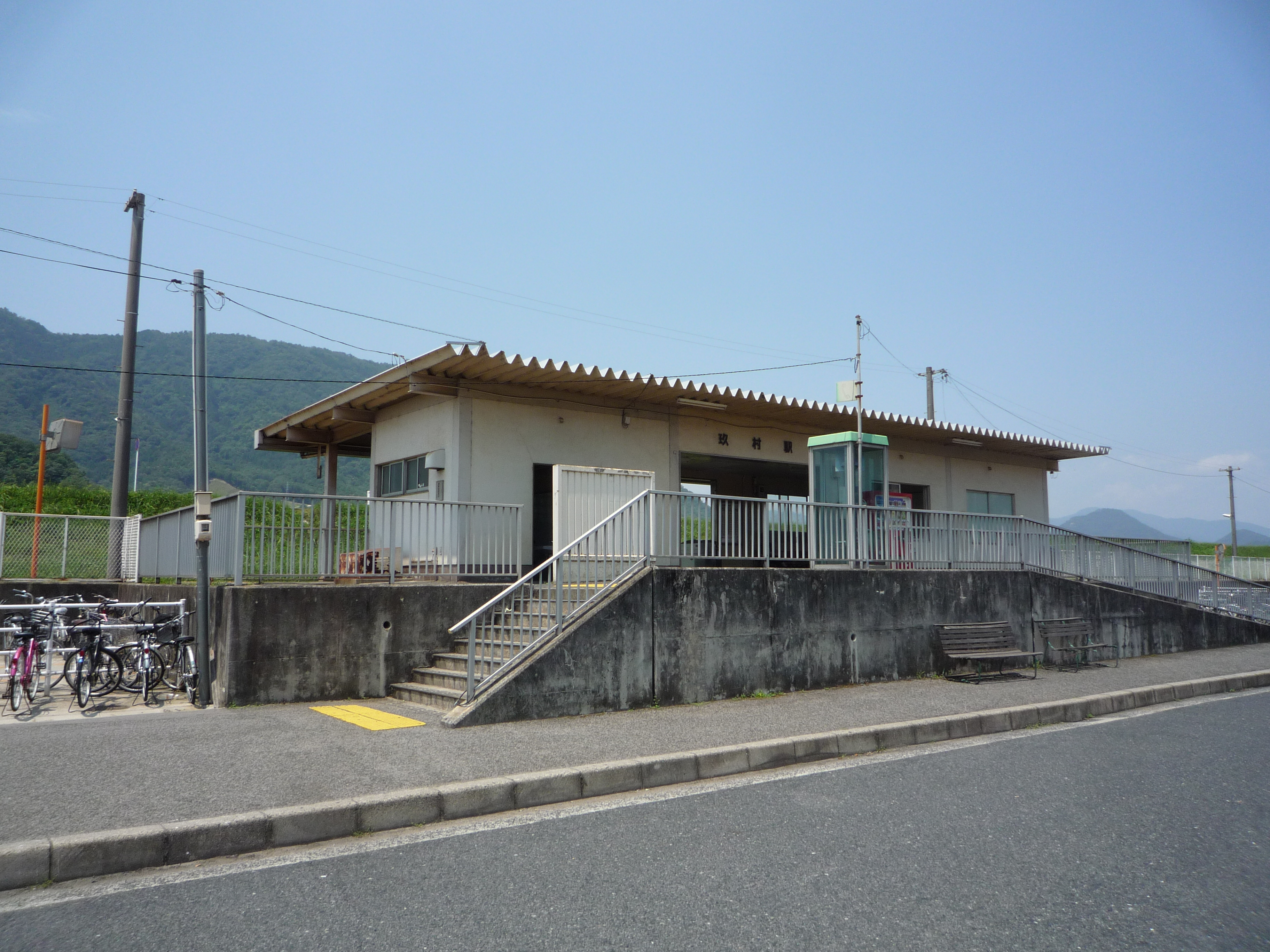 玖村駅